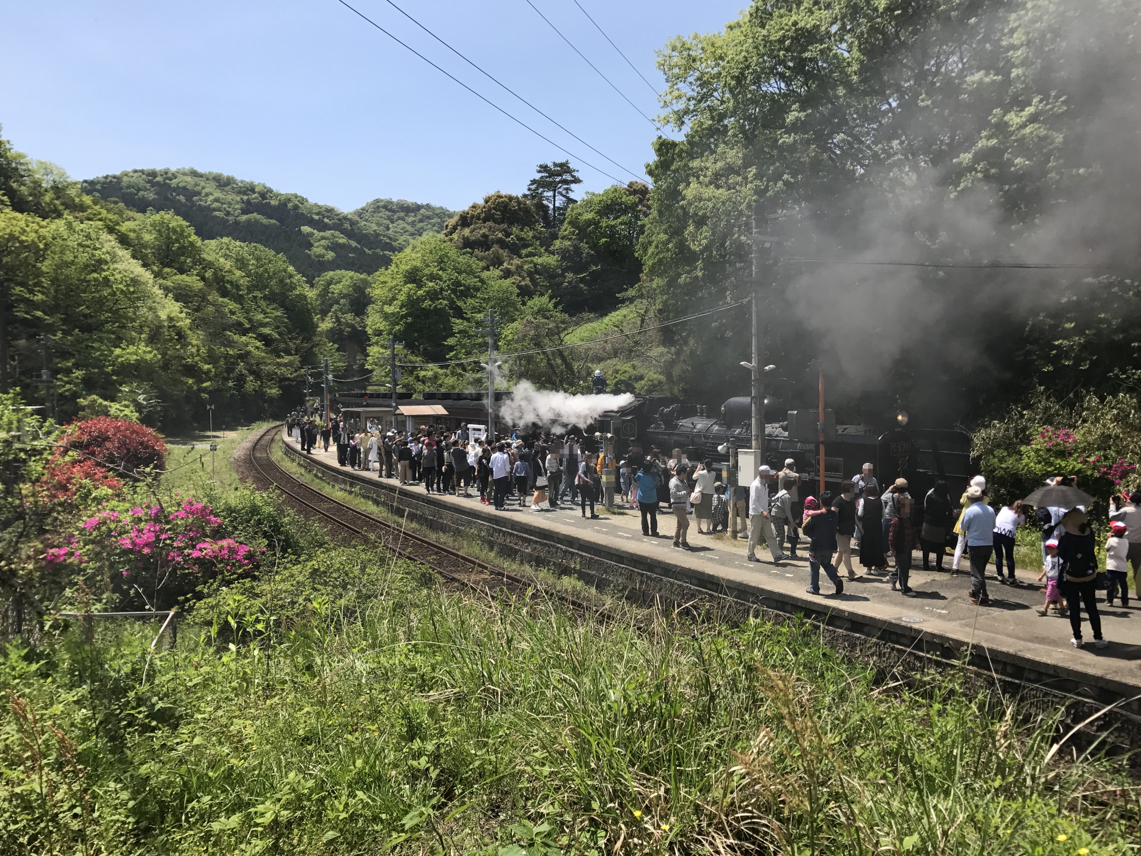 仁保駅のホーム(奥は宮野方面)